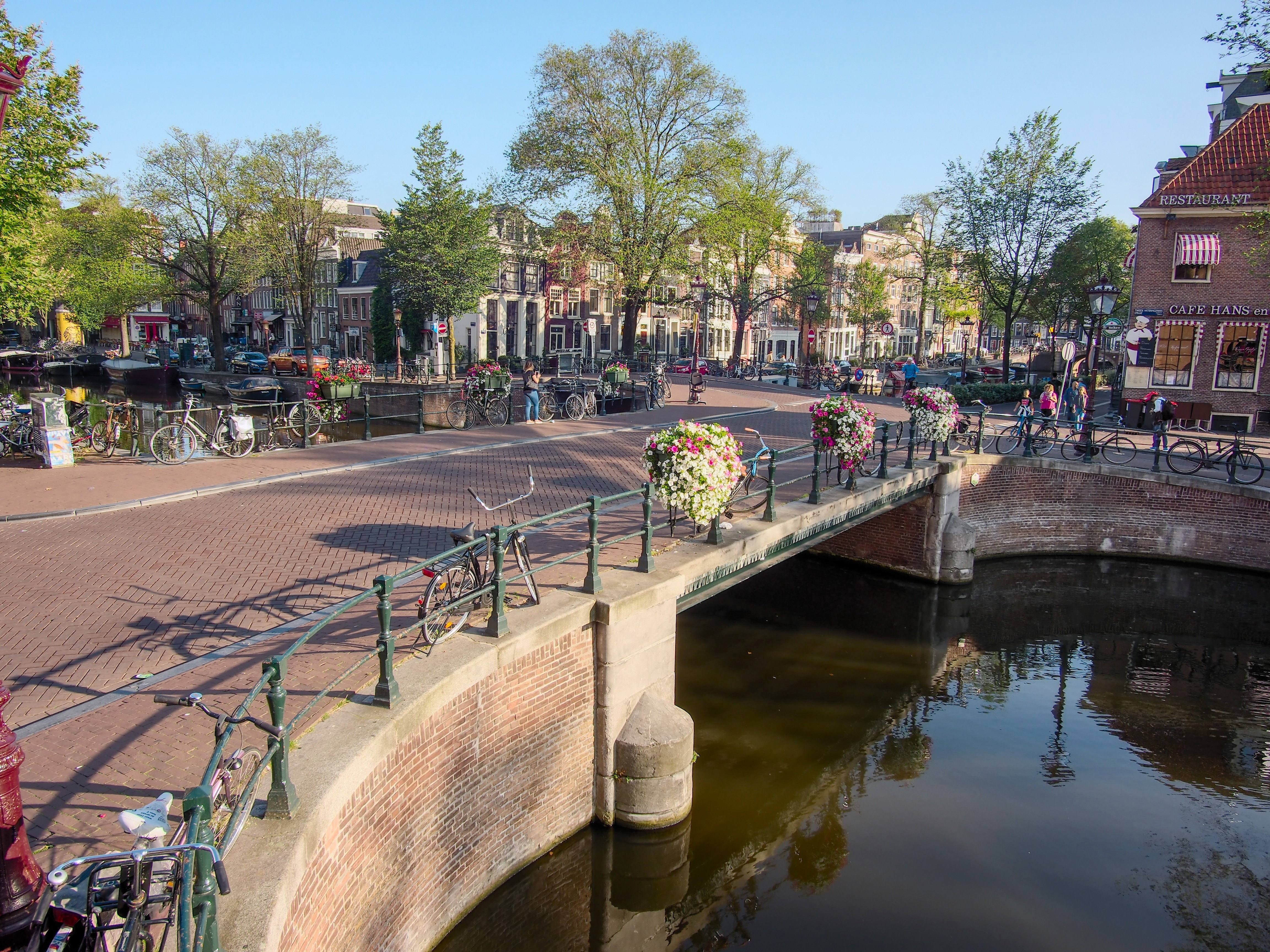 Photographed at Amsterdam, The Netherlands; voor brug 97, rechts (Hans en Grietje) Spiegelgracht 27, linksmidden Spiegelgracht 38 (witte ondergevel) .